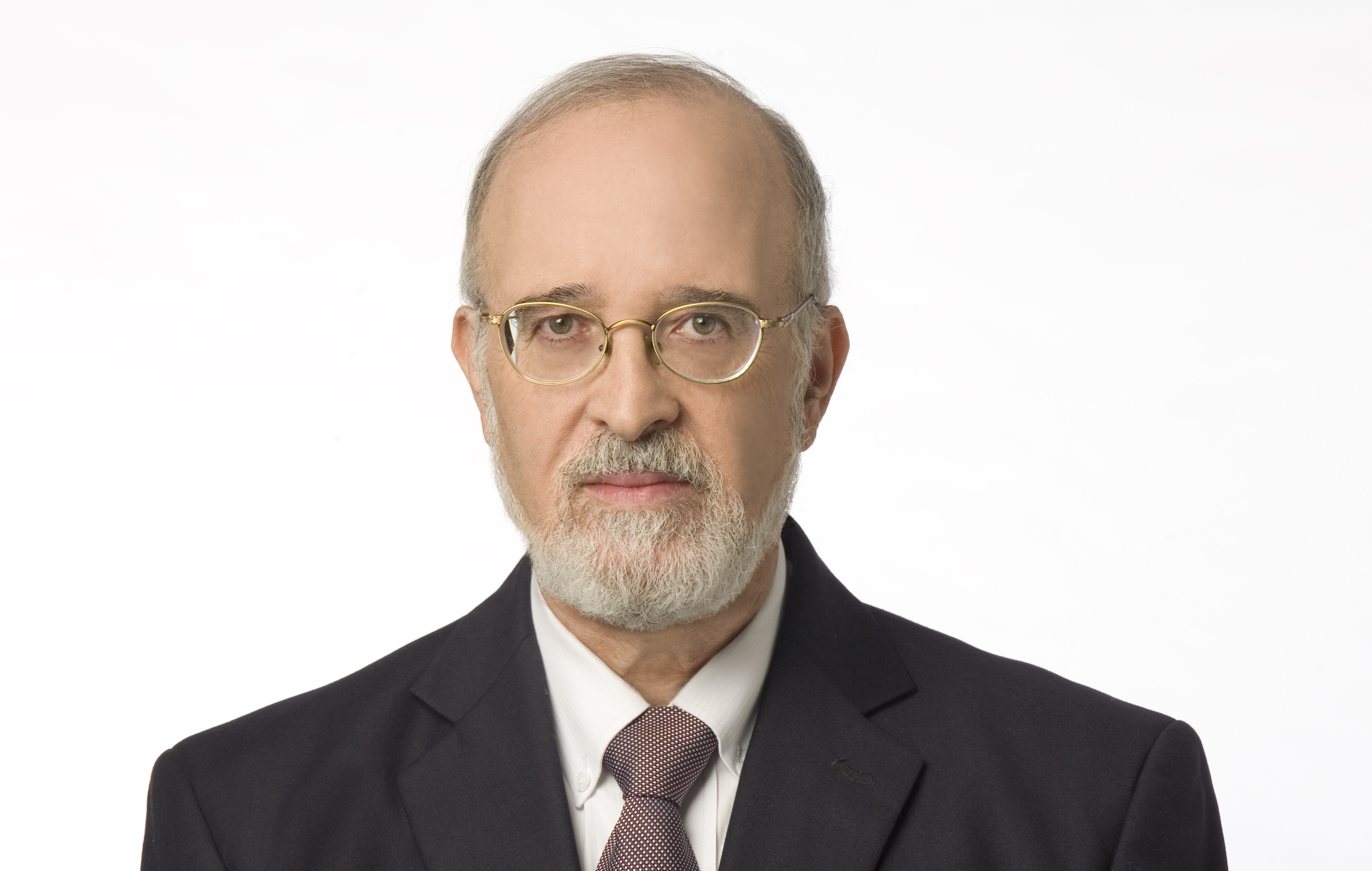 תמונה של ח"כ פרופ' אלוף במיל יצחק בן ישראל